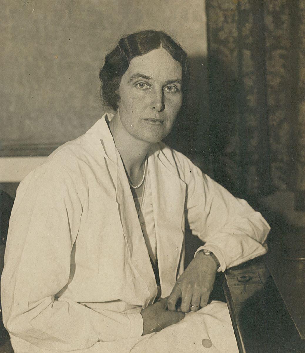 Tove Kathrine Møller, kjent som Tove Mohr, portrett, kvinne, godseier, lege, kvinnesaksforkjemper, forfatter, sittende halvfigur ved skrivebord.